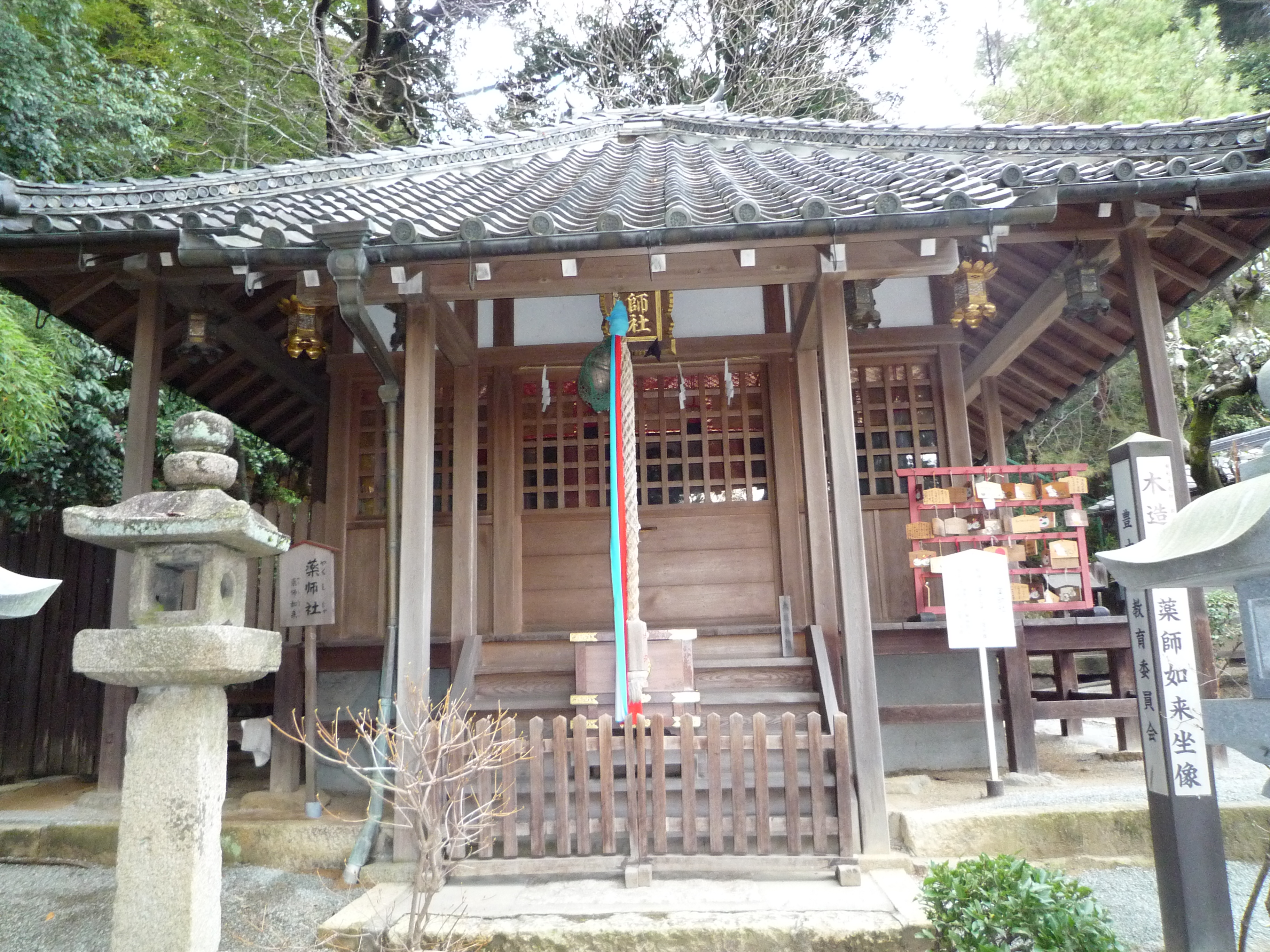 春日神社の薬師社